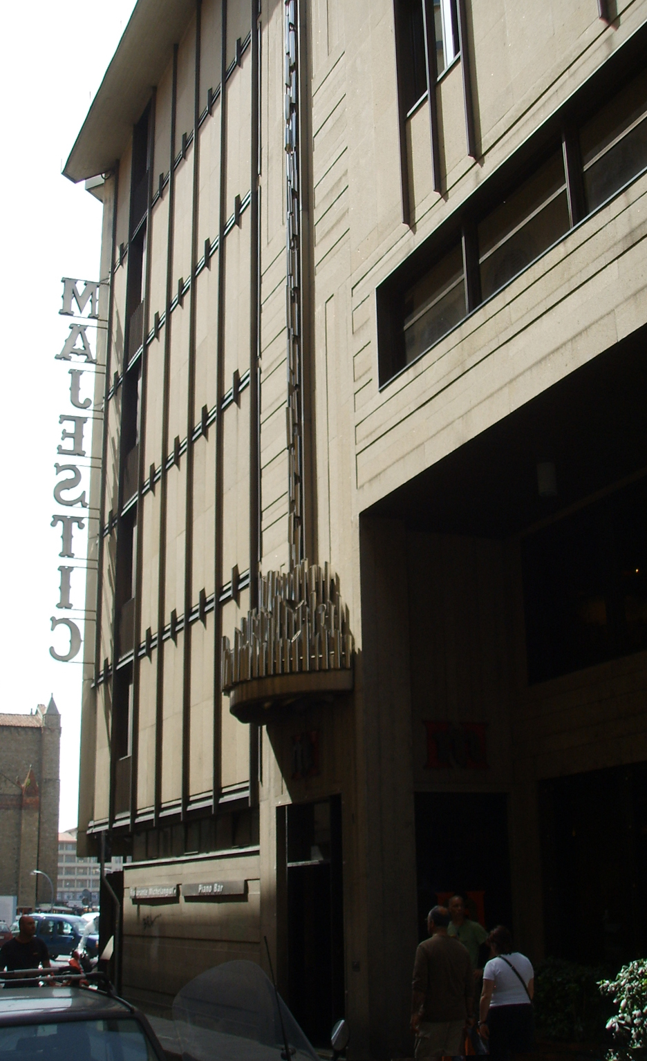 Hotel majestic, entrata laterale